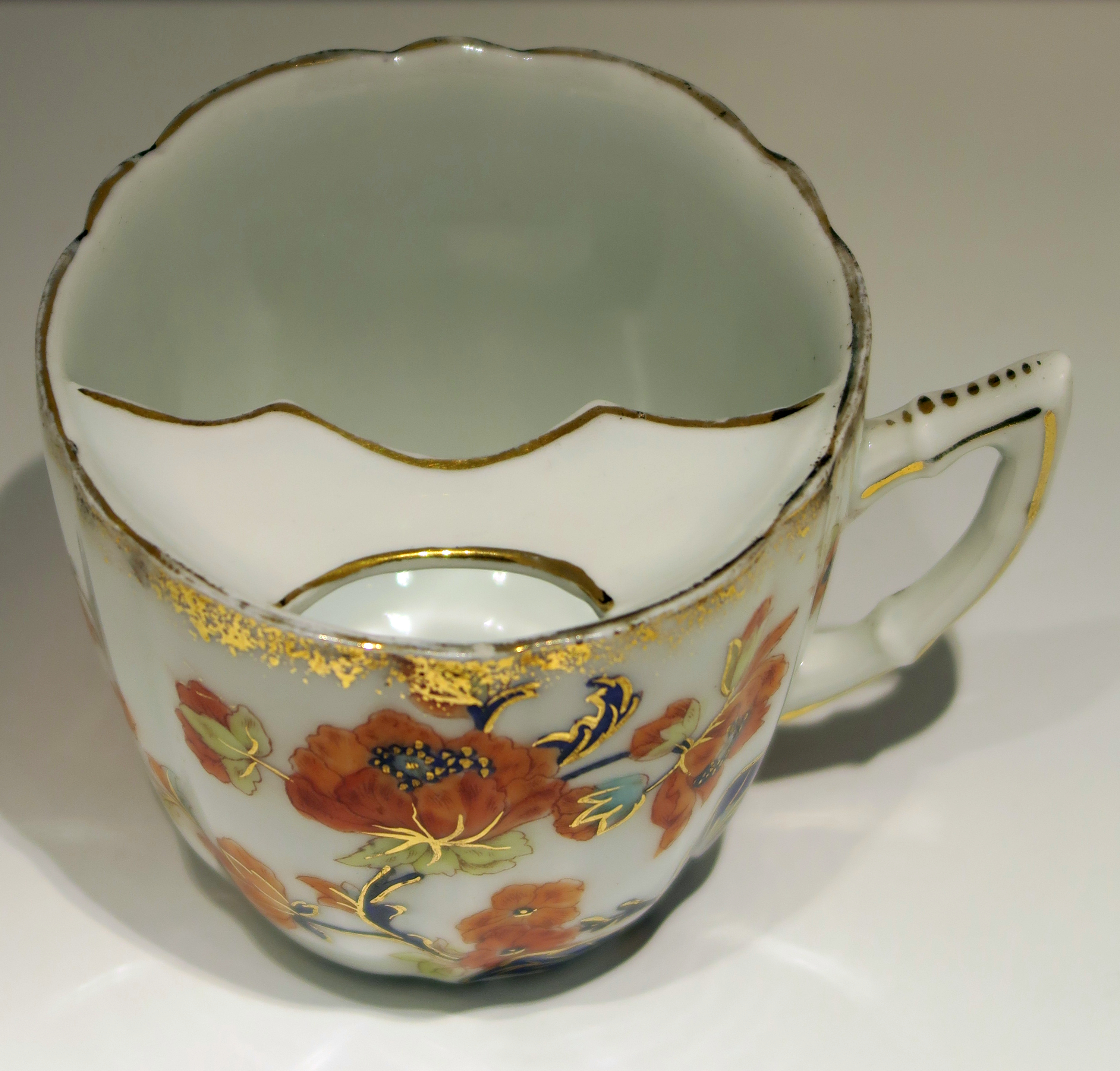 Barttasse, Tirschenreuth um 1880, Aufglasurbemalung mit Goldstaffagen